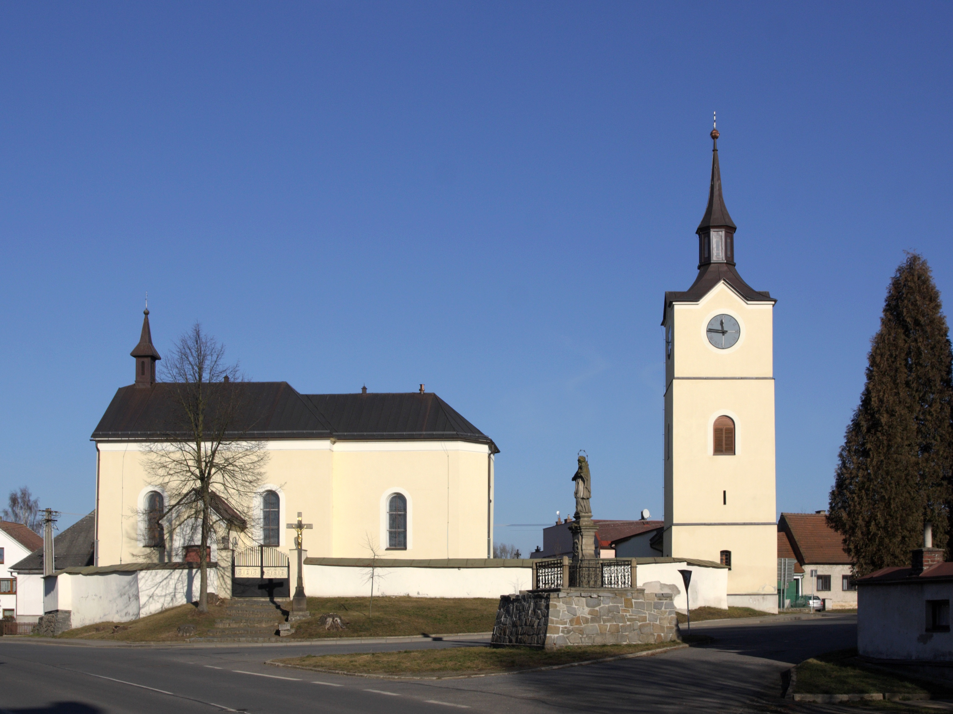 Ostrov nad Oslavou - kostel svatého Jakuba Většího.